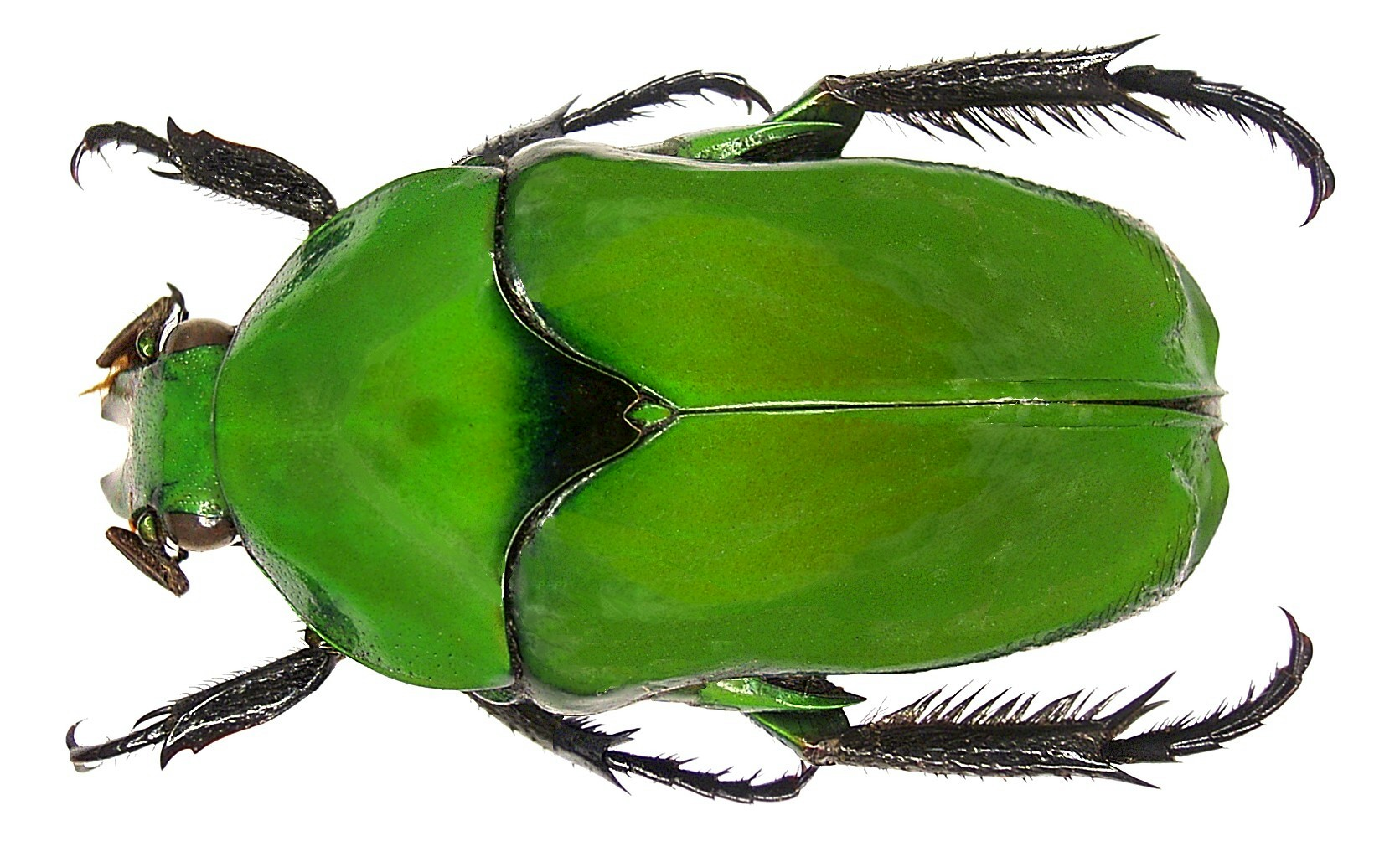 Familie: Scarabaeidae Grösse: 24,5 mm Fundort: Indonesien, Irian Jaya, Manokwari, Mt. Arfak leg.det. A.Skale, 2007 Foto: U.Schmidt, 2007